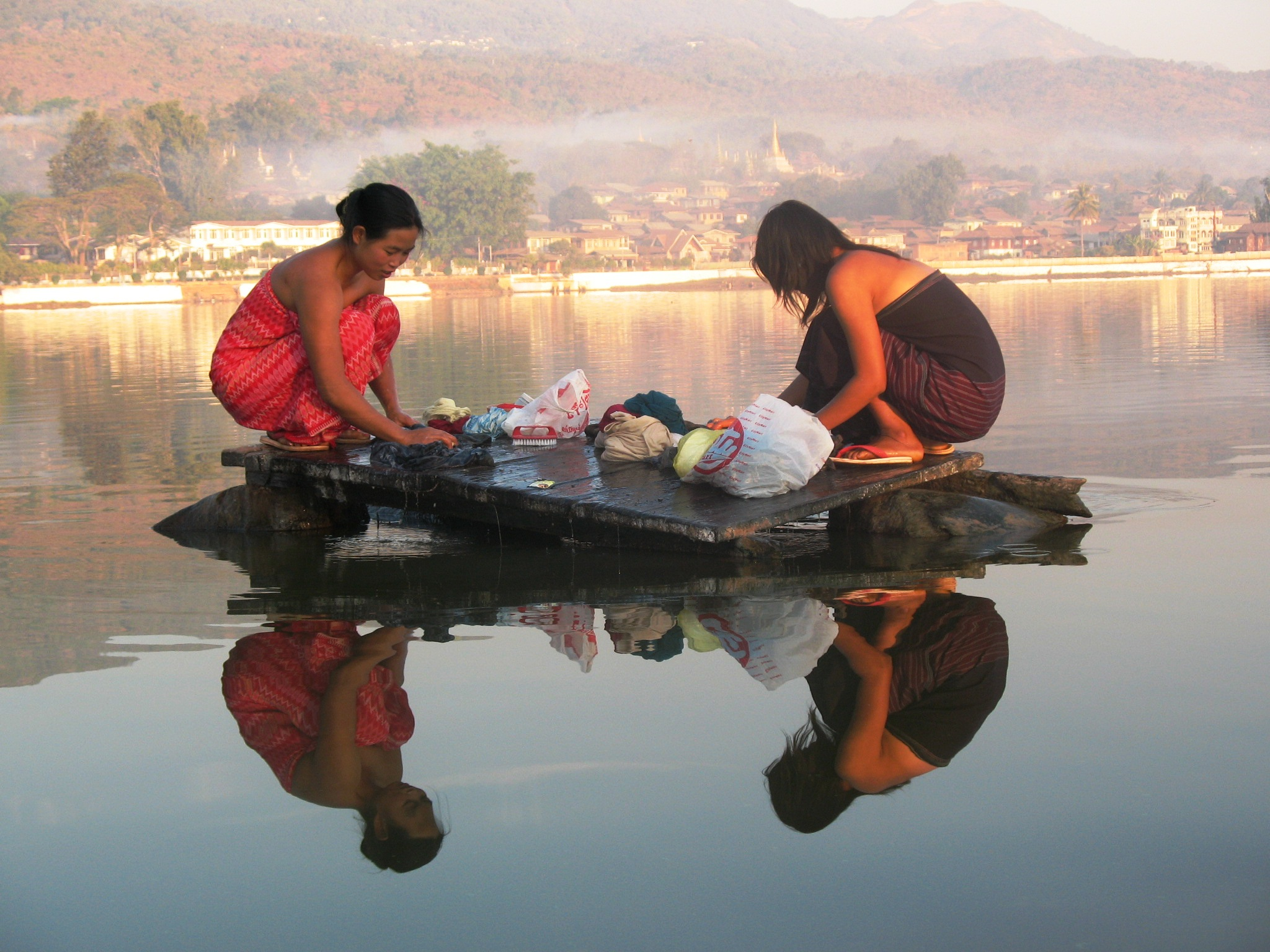 נערות בורמזיות כובסות באגם